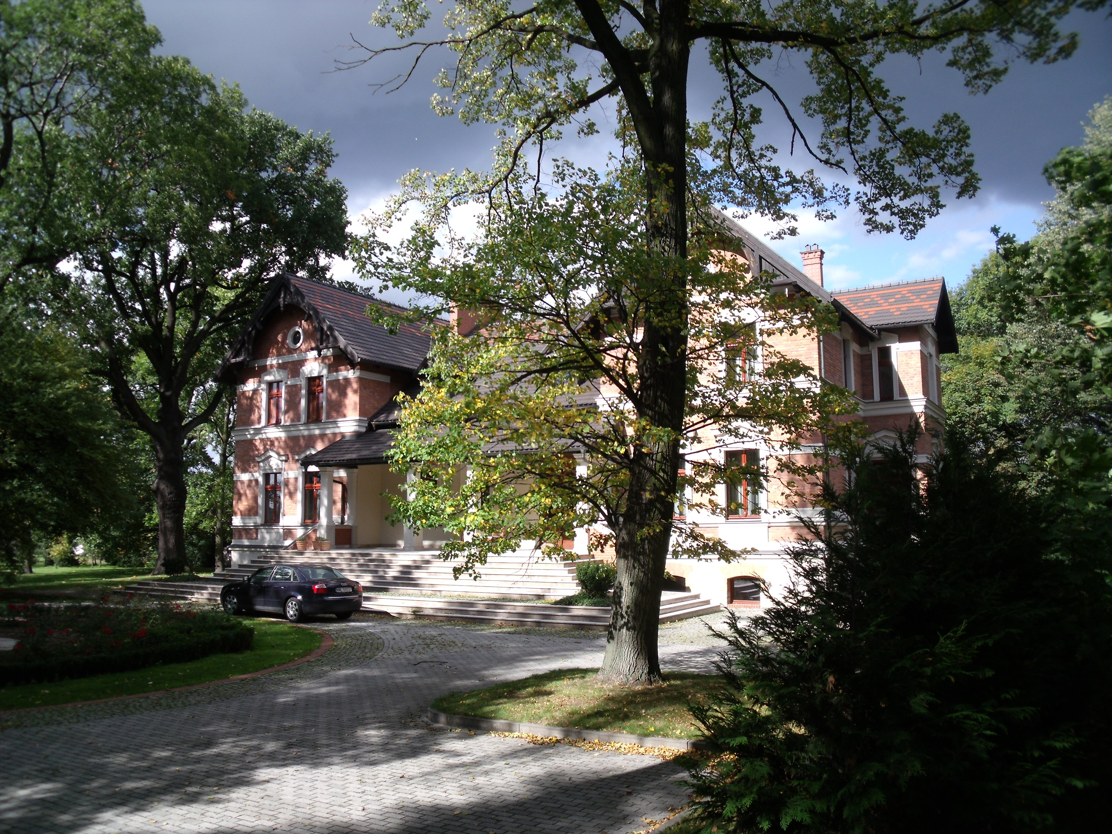 Orzesze Gardawice, ul. Katowicka 33 - zespół dworsko-parkowy (zabytek nr A/1651/97 z 17.11.1997)